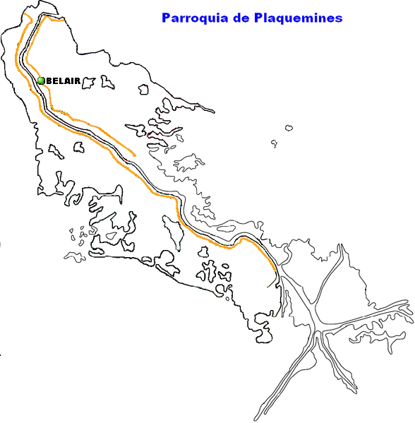 Belair Louisiana